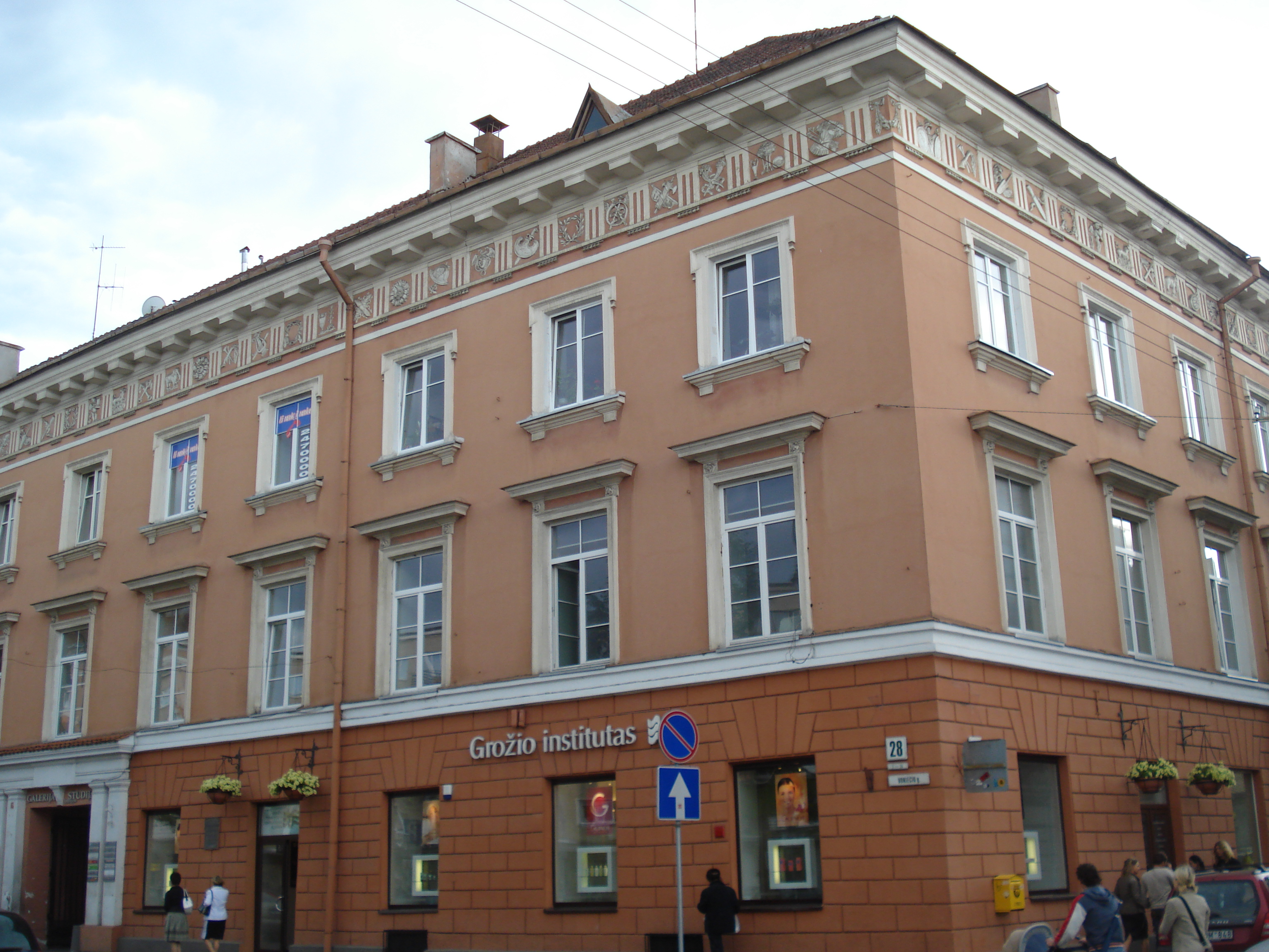 Tyzenhauz Palace in Vilnius. Vokiečių 28